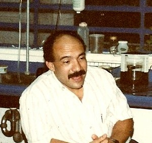 Guido A. Pereira Suárez carcinologo venezolano en el laboratoriao de biología de crustaceos IZT